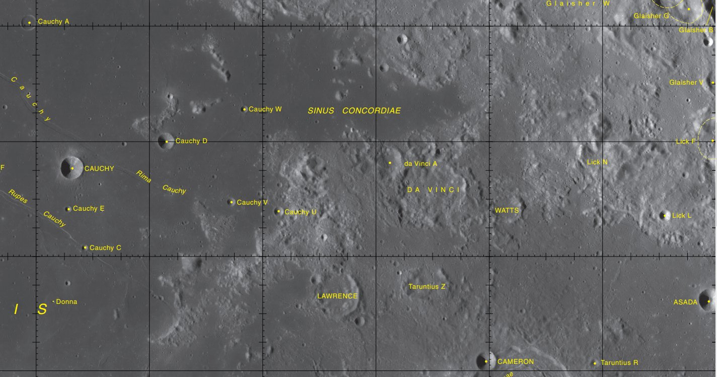 Cráter lunar Da Vinci. Localización (LRO)